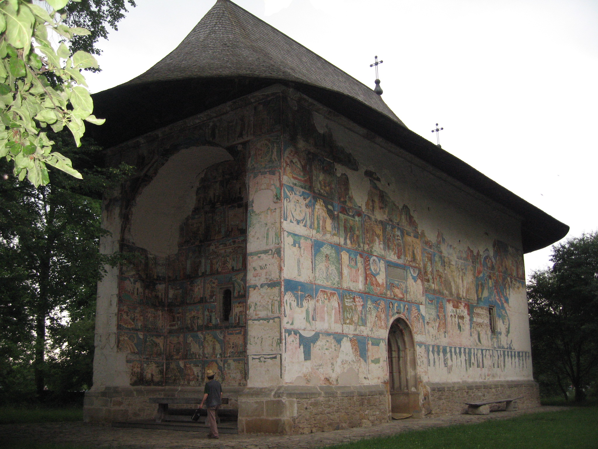 Mănăstirea Arbore